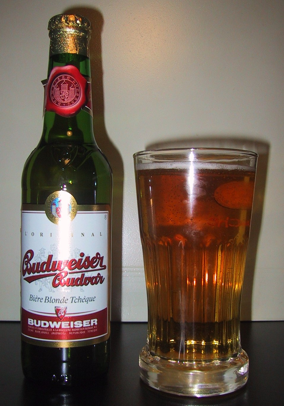 Budweiser Budvar beer (Czech Republic).